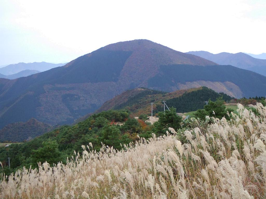 腕山の牧場から見た中津山